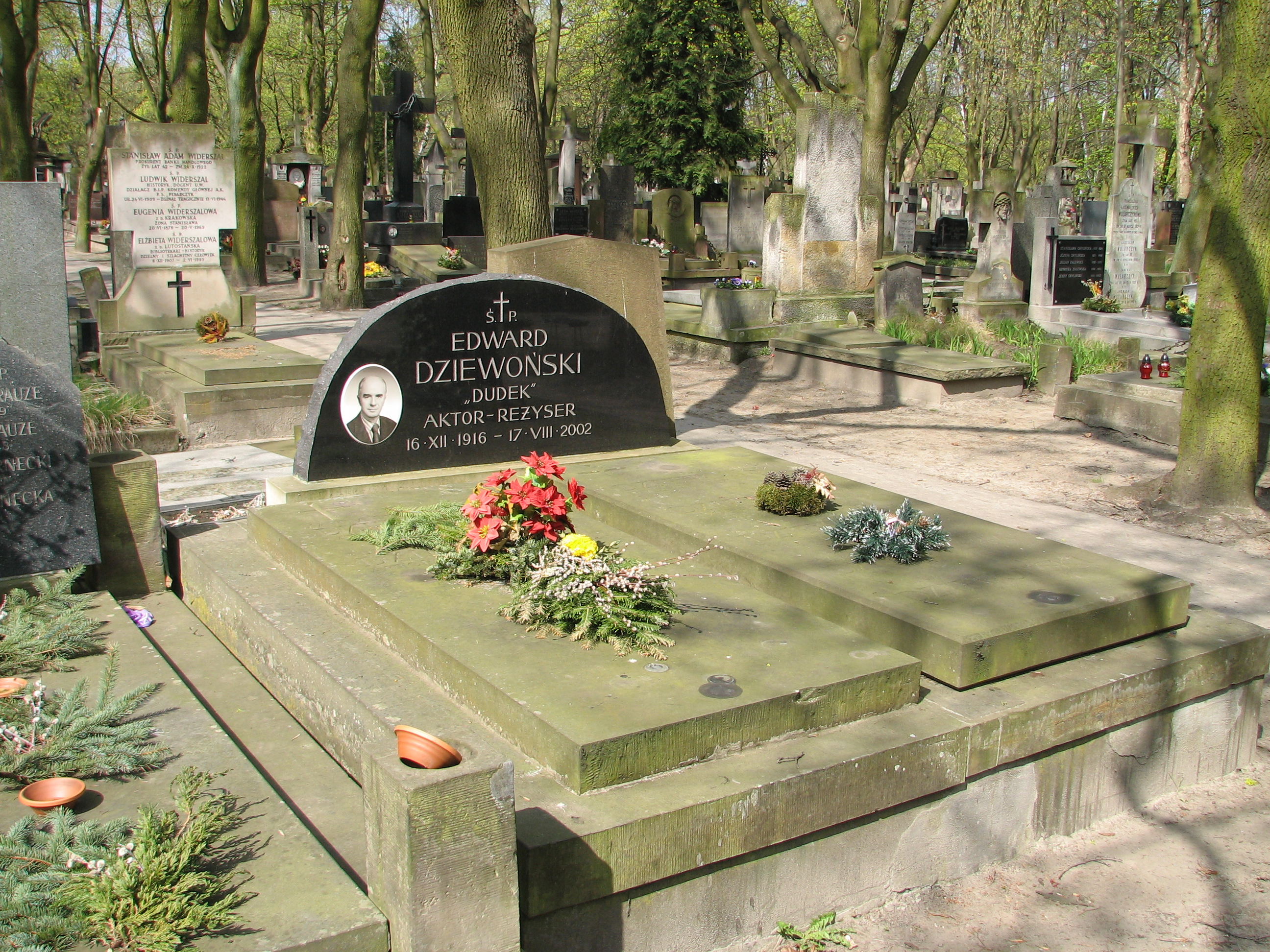 Edward Dziewoński grób - Warszawa, Cmentarz Powązkowski.